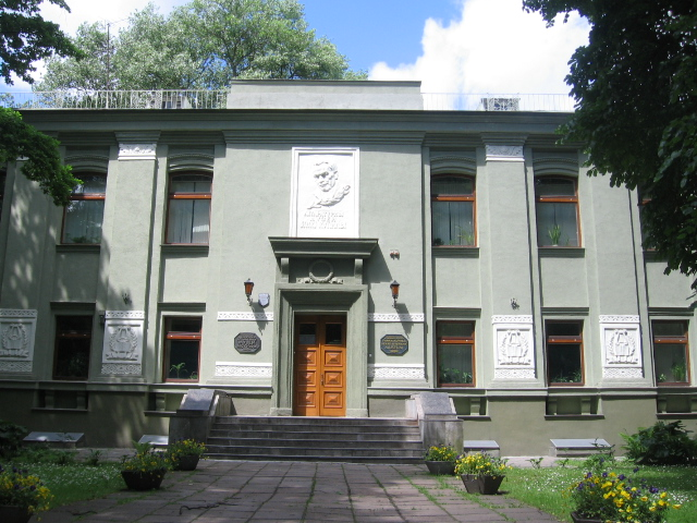 Парк Янки Купалы. Музей Янки Купалы.